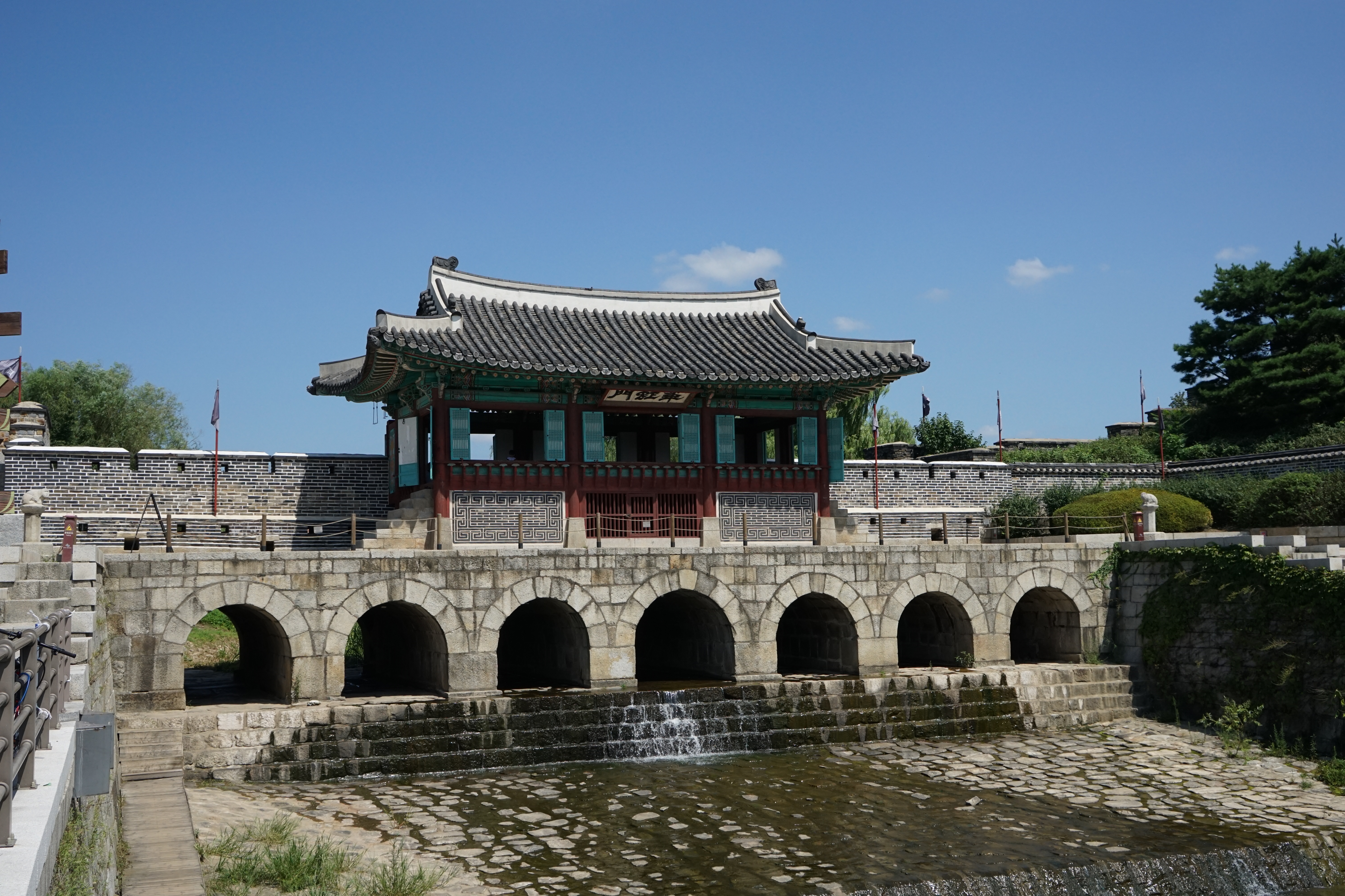 中文（台灣）: 水原華城 華虹門